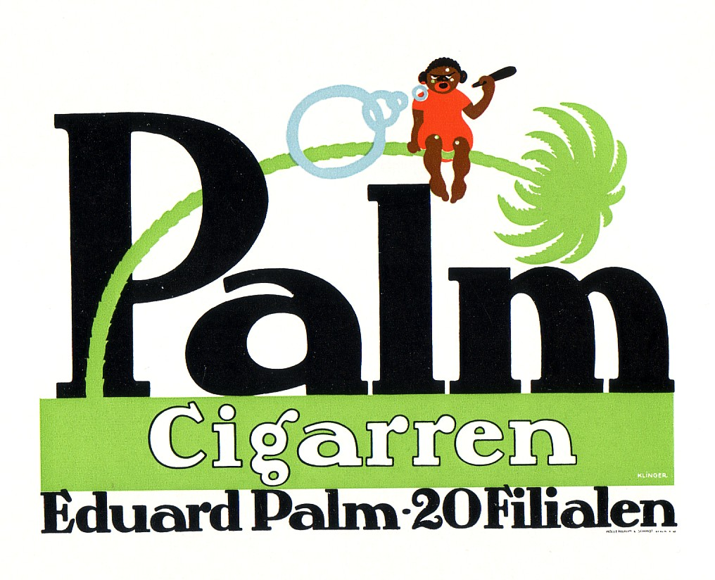 Plakat für "Palm Cigarren".